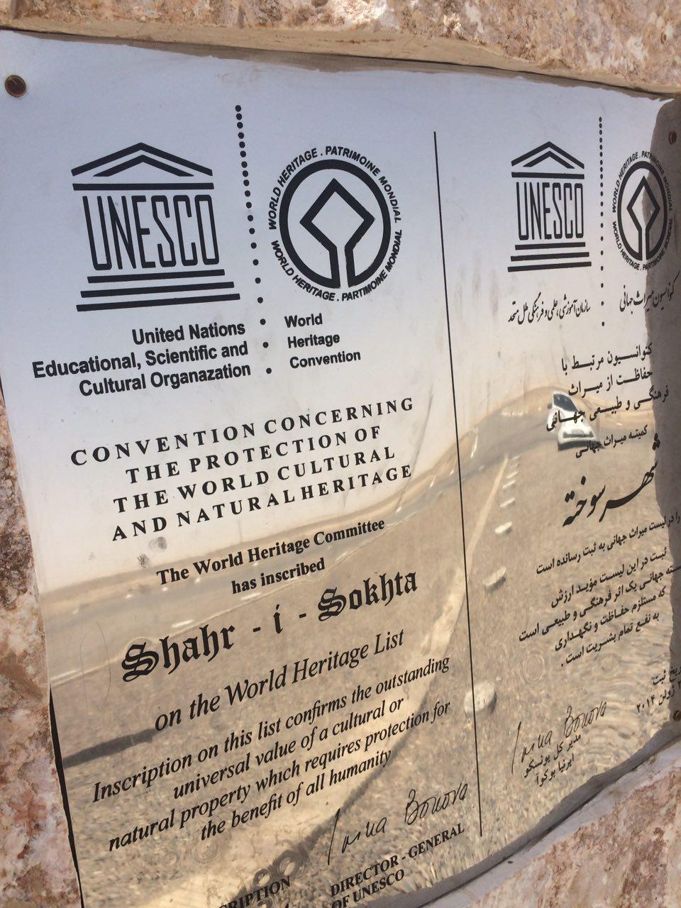 توضیحات در مورد ثبت یونسکو شدن شهر سوخته